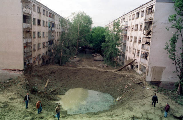 Нови Сад 1999. године. Нато пројектил током бомбардовања СР Југославиа, погодио је простор између две стамбене зграде и Основне школе Светозар Марковић Тоза.